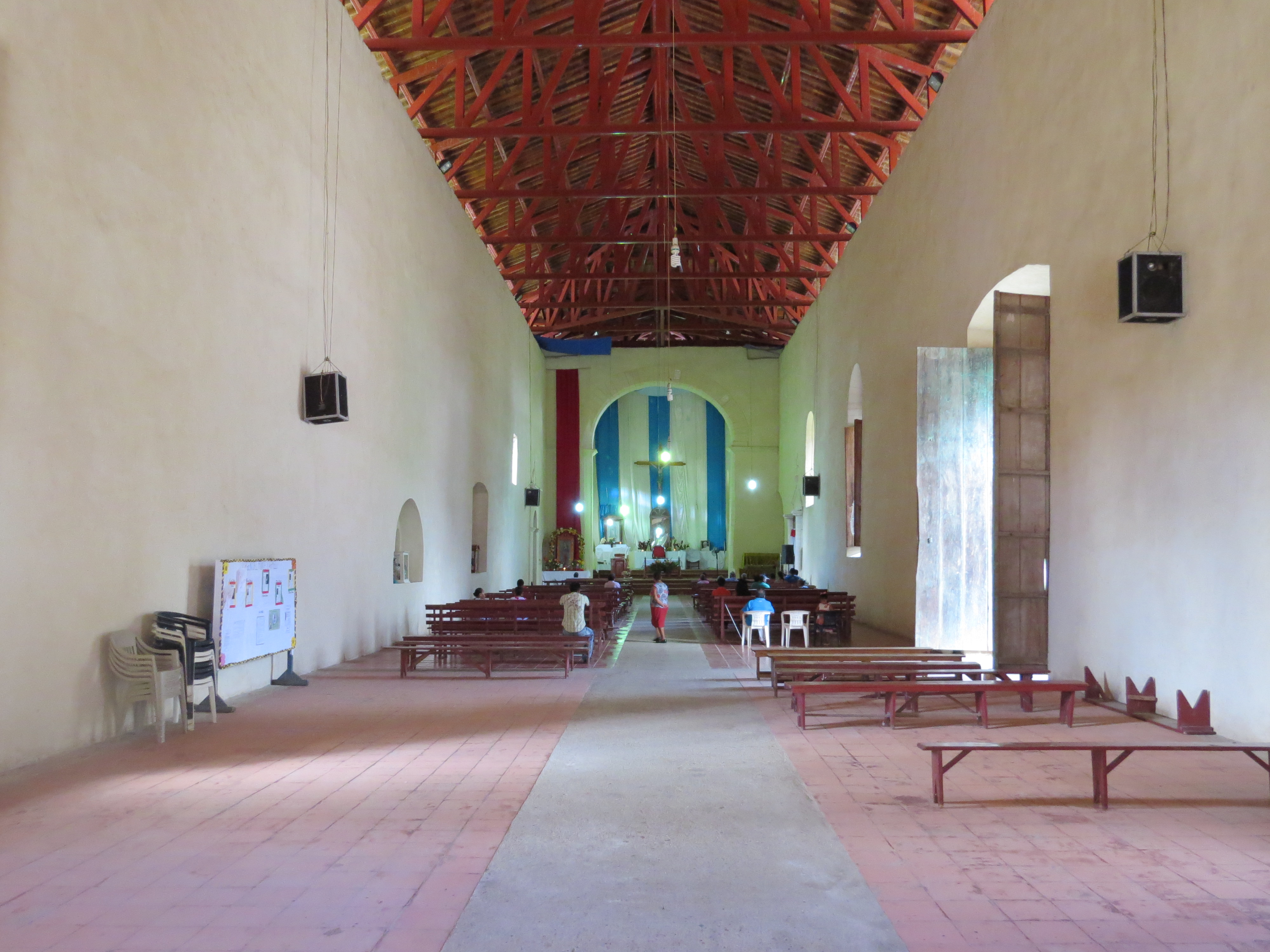 Oxolotán, municipio de Tacotalpa, Tabasco, México.